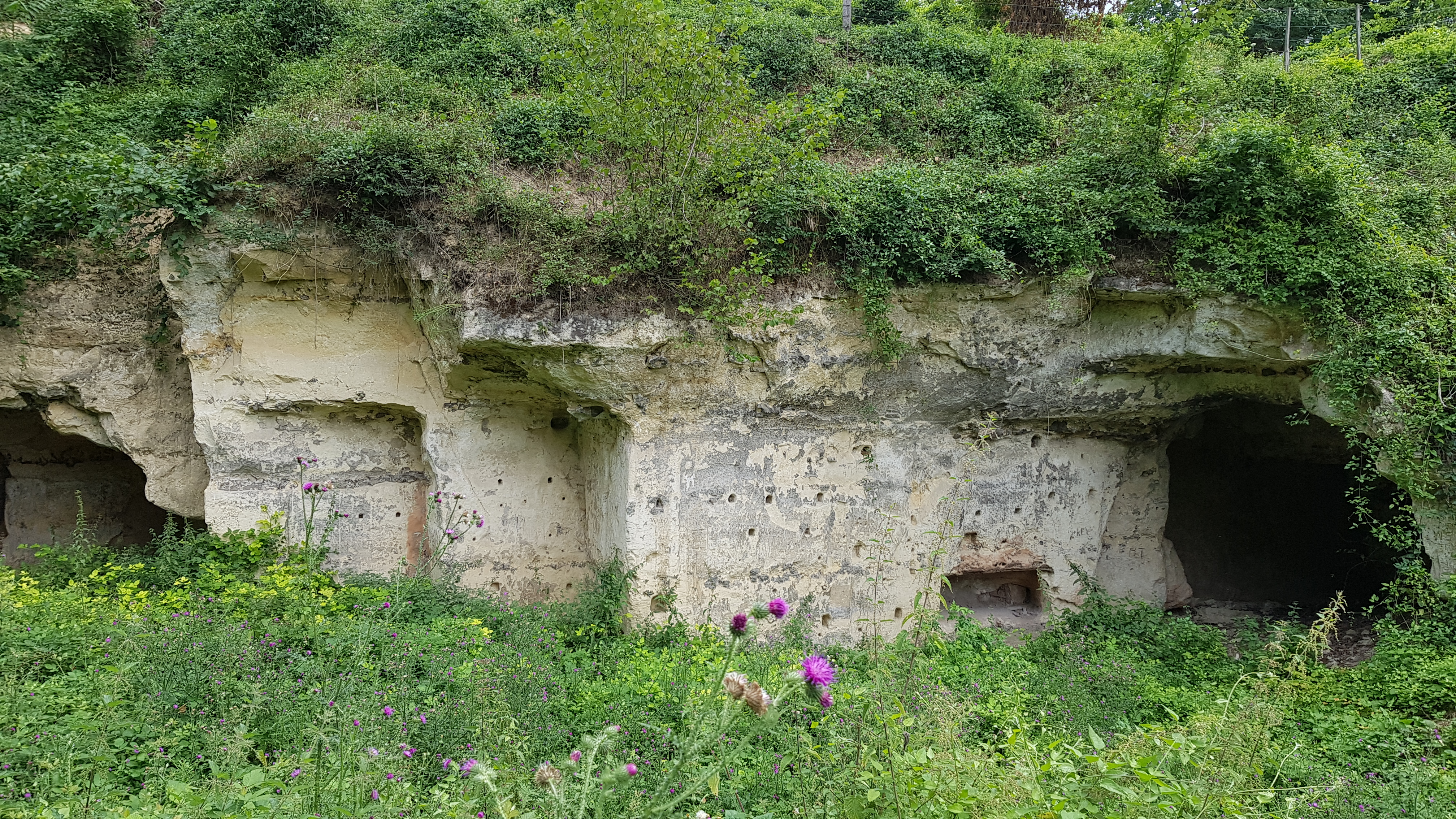 Riesenberggroeve in het Savelsbos, Gronsveld, Nederland